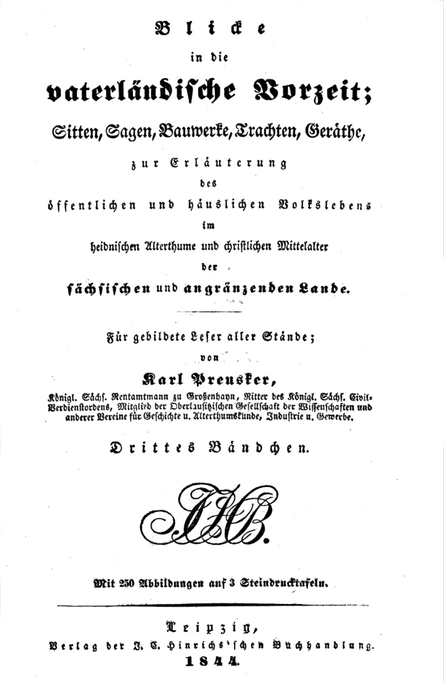 Titelblatt des dritten Bandes des Hauptwerkes von Karl Preusker Blicke in die vaterländische Vorzeit